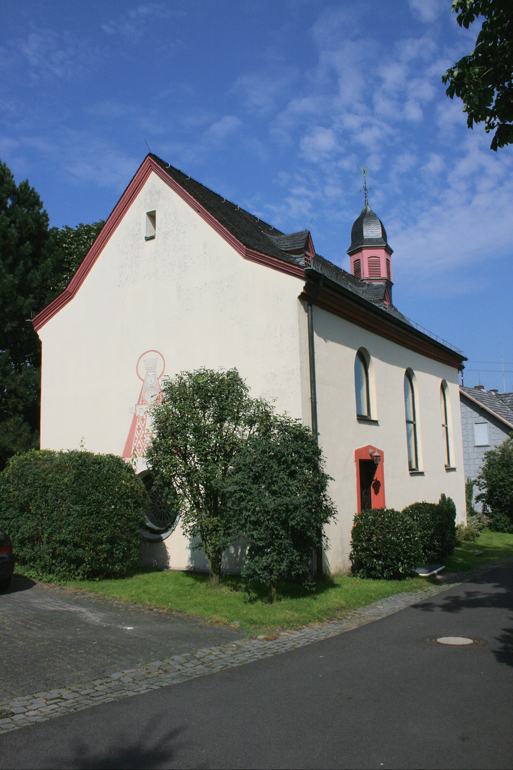 Katholische Kapelle in Windeck-Leuscheid